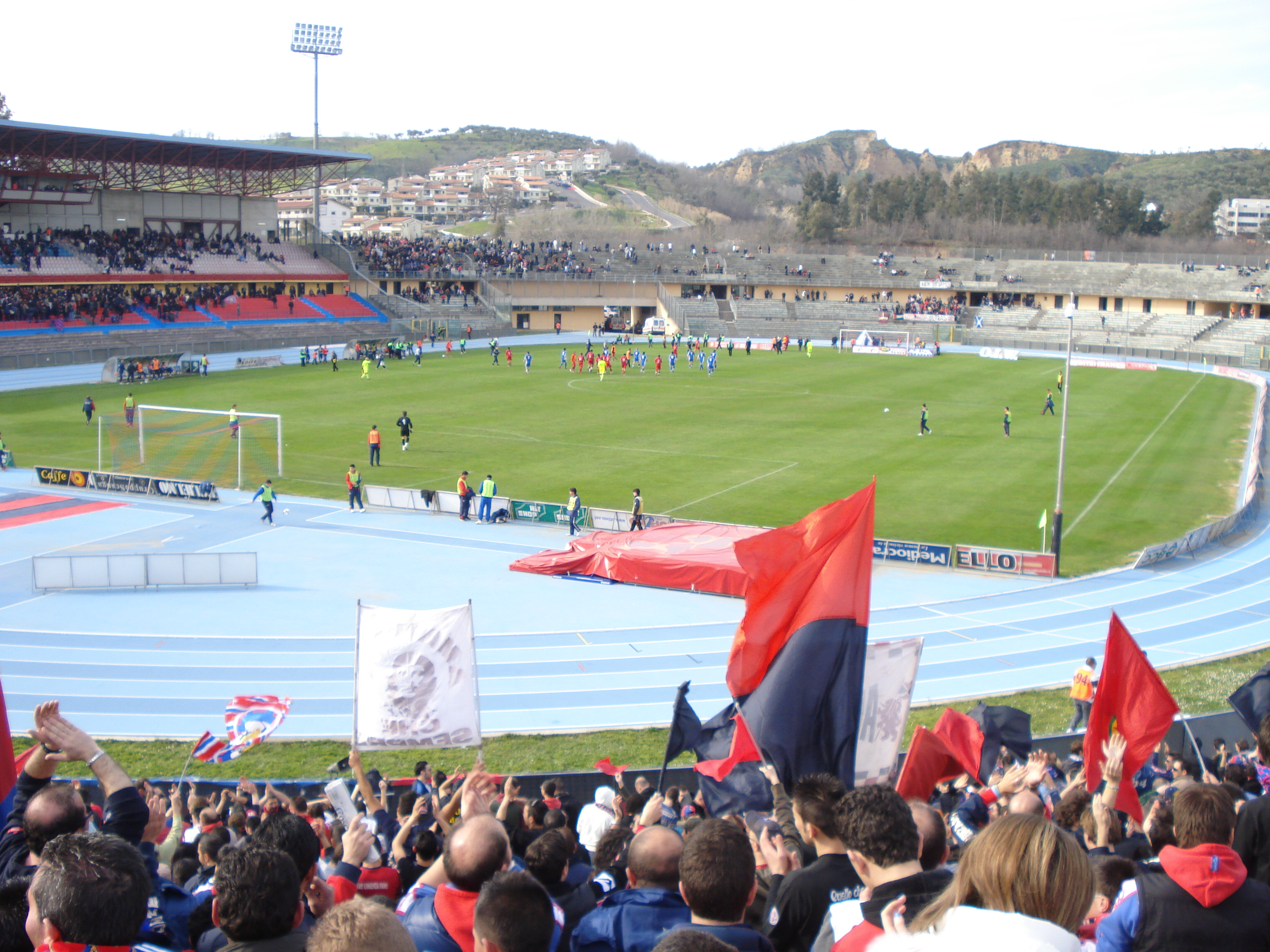 VEDUTA DELLO STADIO SAN VITO DI COSENZA DALLA CURVA SUD "DONATO BERGAMINI" CON VISUALE SULLA CURVA NORD "MASSIMILIANO CATENA" E LA TRIBUNA A